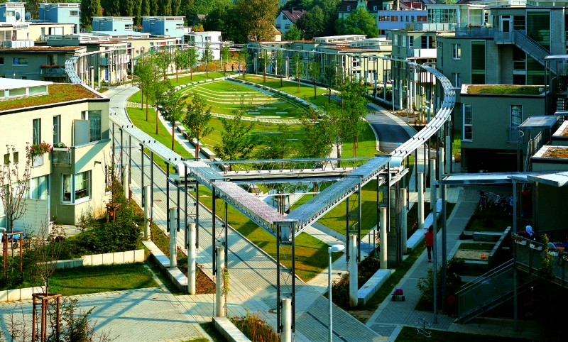 Wohnbebauung Küppersbuschgelände IBA Emscher Park, Gelsenkirchen, Szyszkowitz-Kowalski